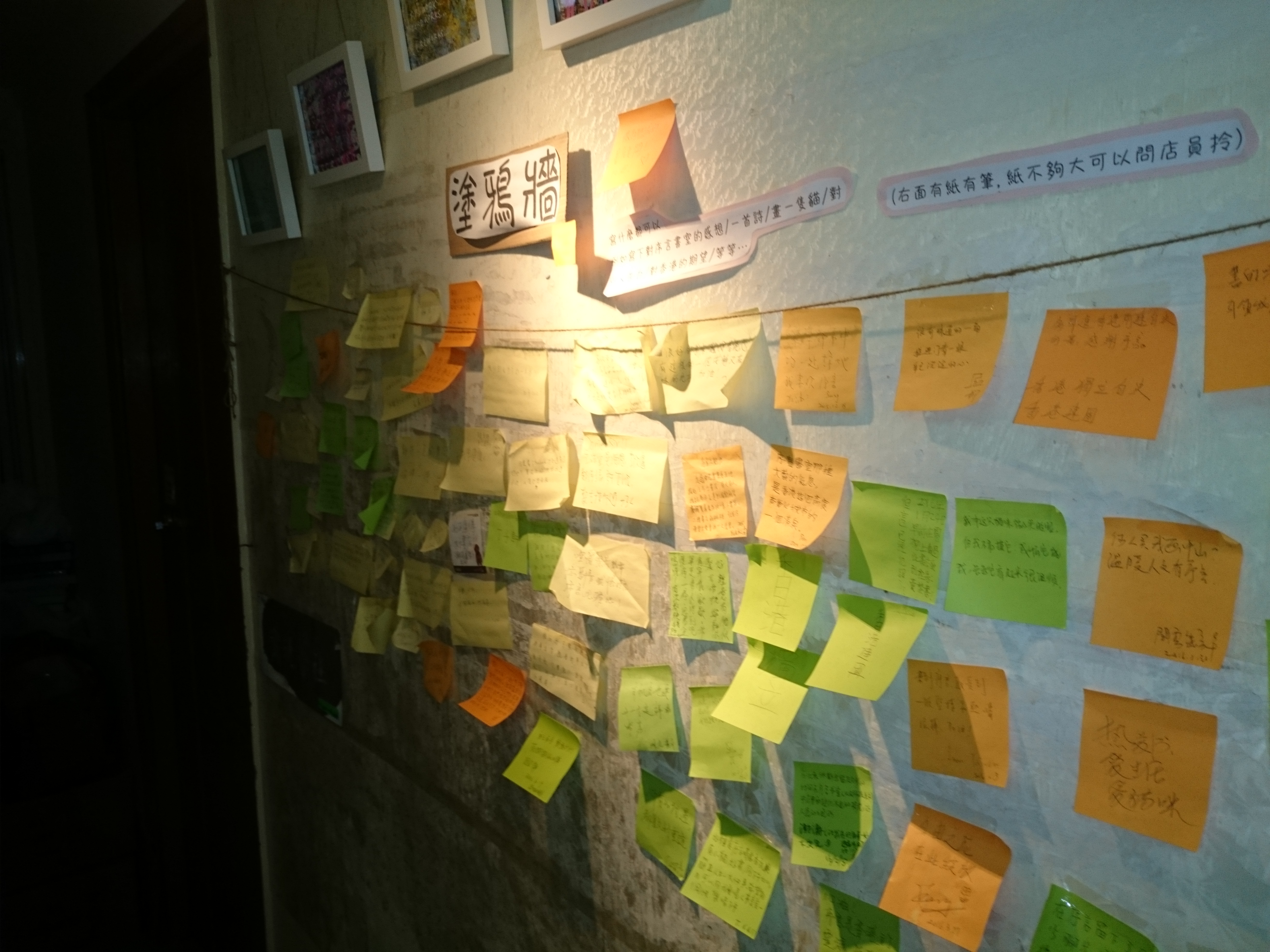 序言書室塗鴉牆。